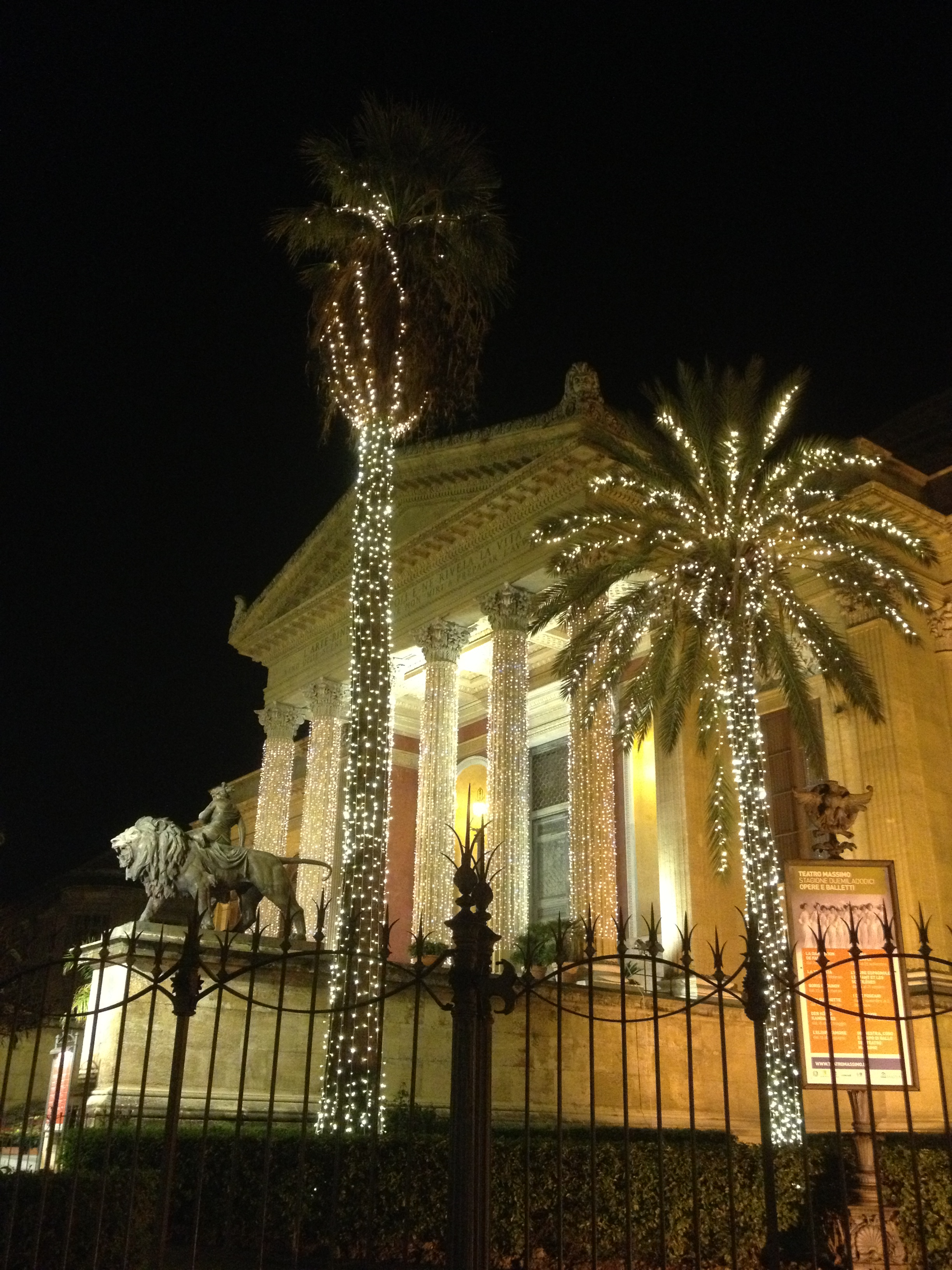 Teatro Massimo di Palermo durante le festività natalizie